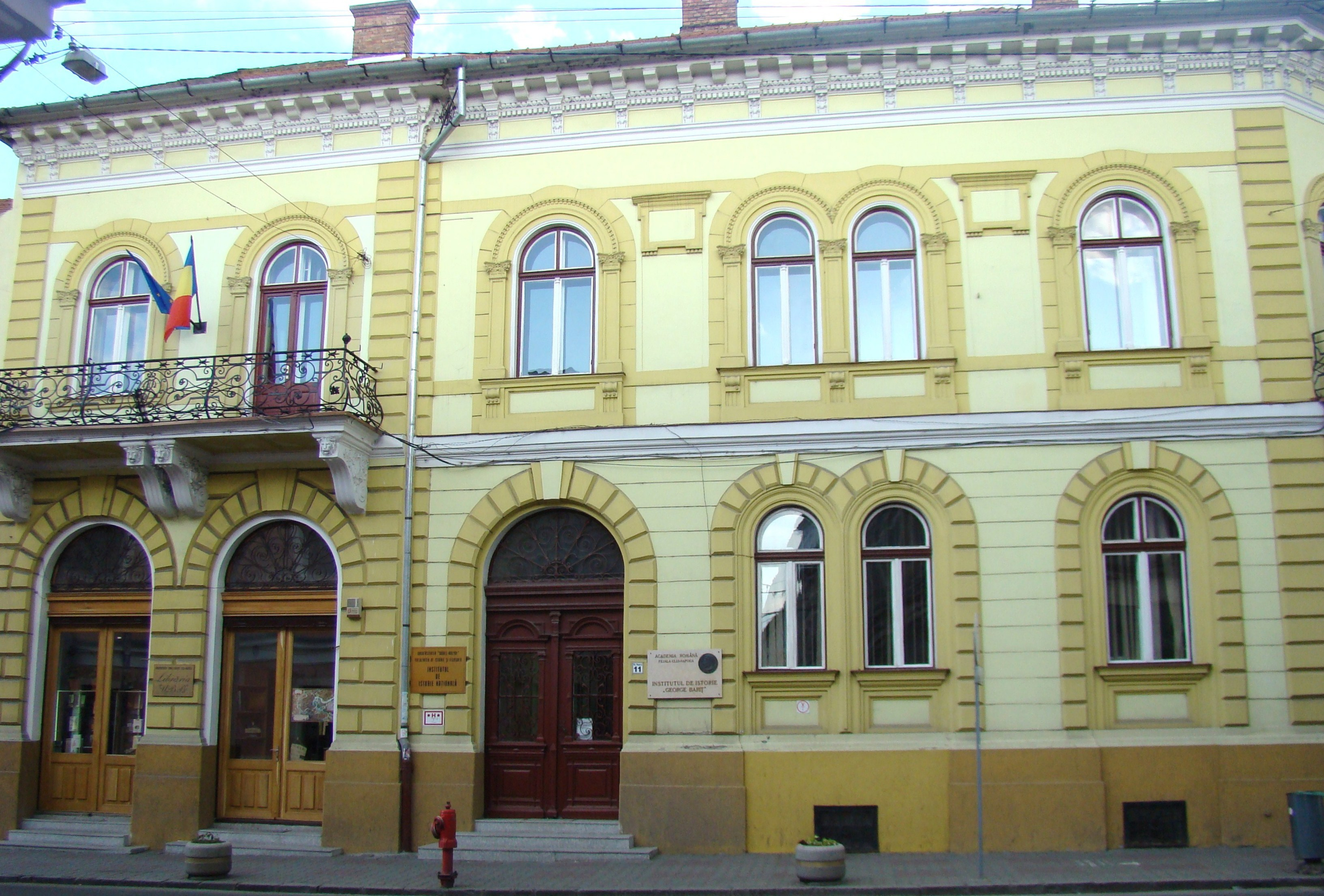 Clădire monument istoric, str.Napoca, nr.11 (Institutul de Istorie Națională)